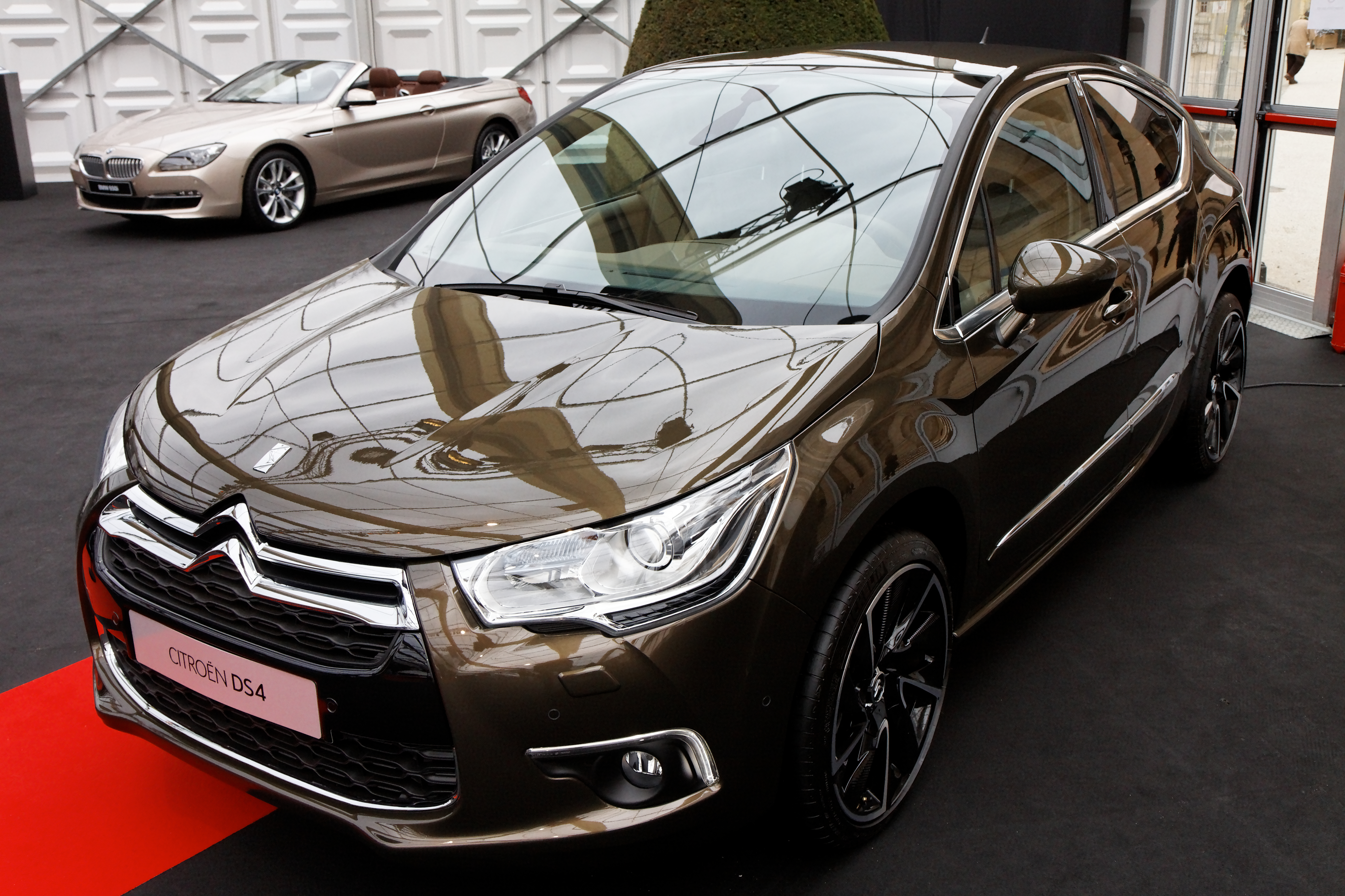 La Citroën DS4 exposée devant le dôme des Invalides lors du festival automobile international 2011.